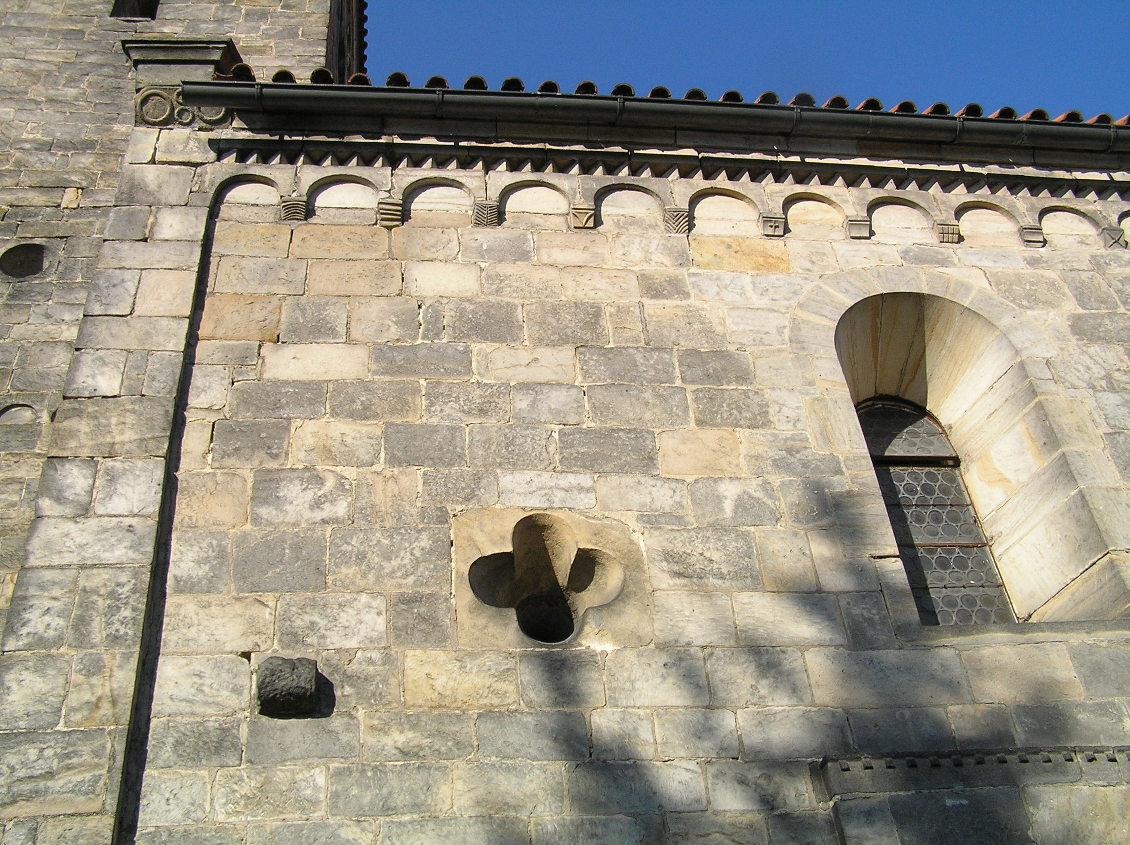 Kostel Nanebevzetí Panny Marie, náves, Mohelnice nad Jizerou.